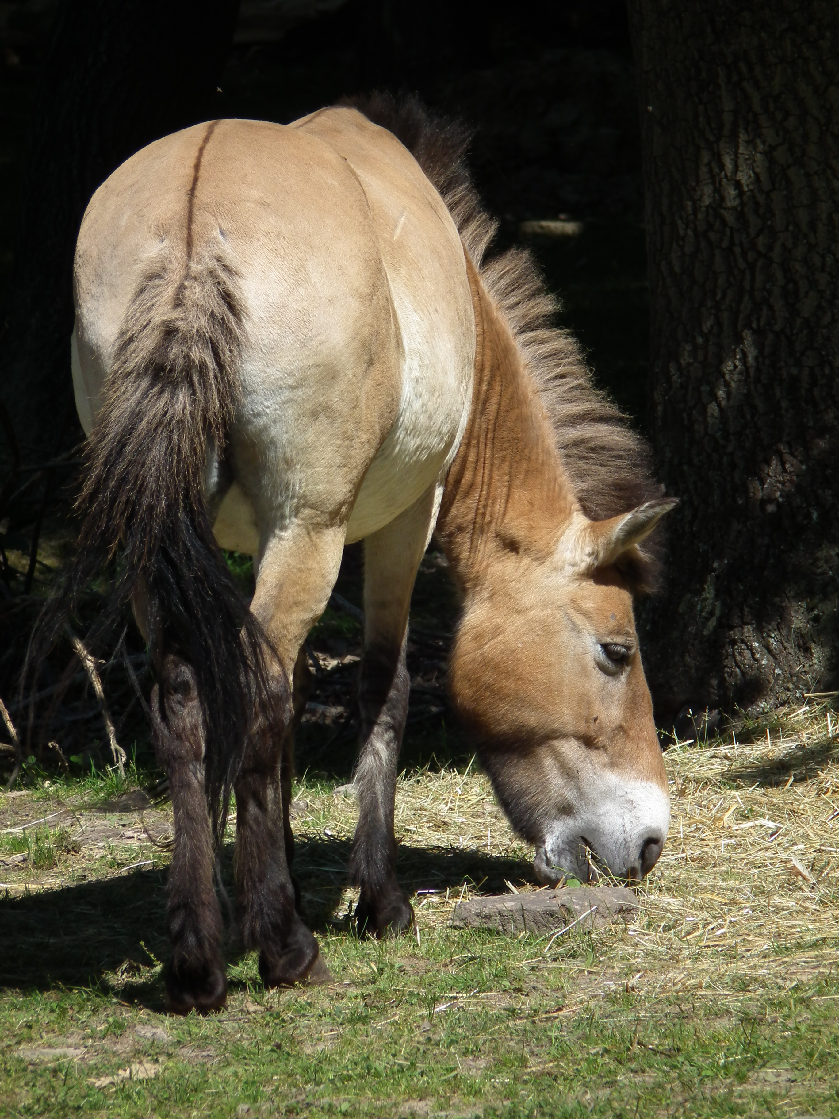 Przewalski-Pferd (Equus przewalskii) im Wildpark Pforzheim (Baden-Württemberg, Deutschland)